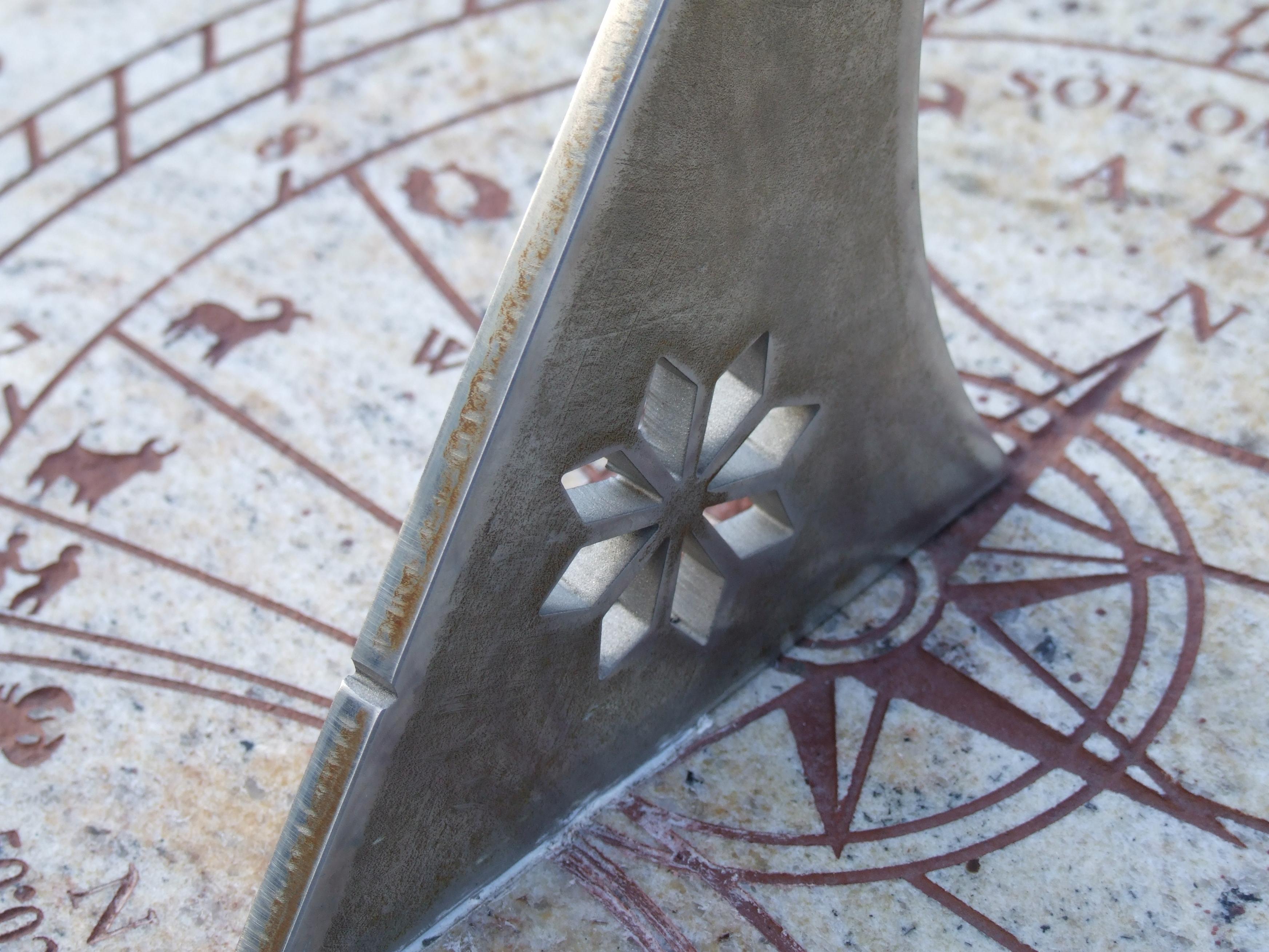 Sunhorloĝo